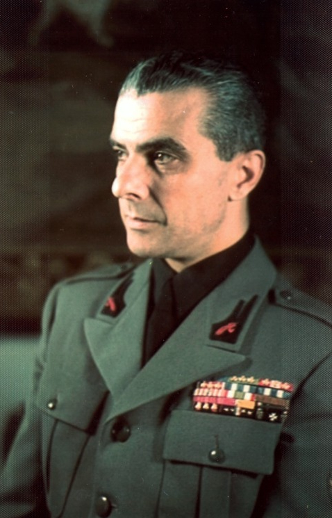 Fotoritratto di Giuseppe Bastianini in uniforme